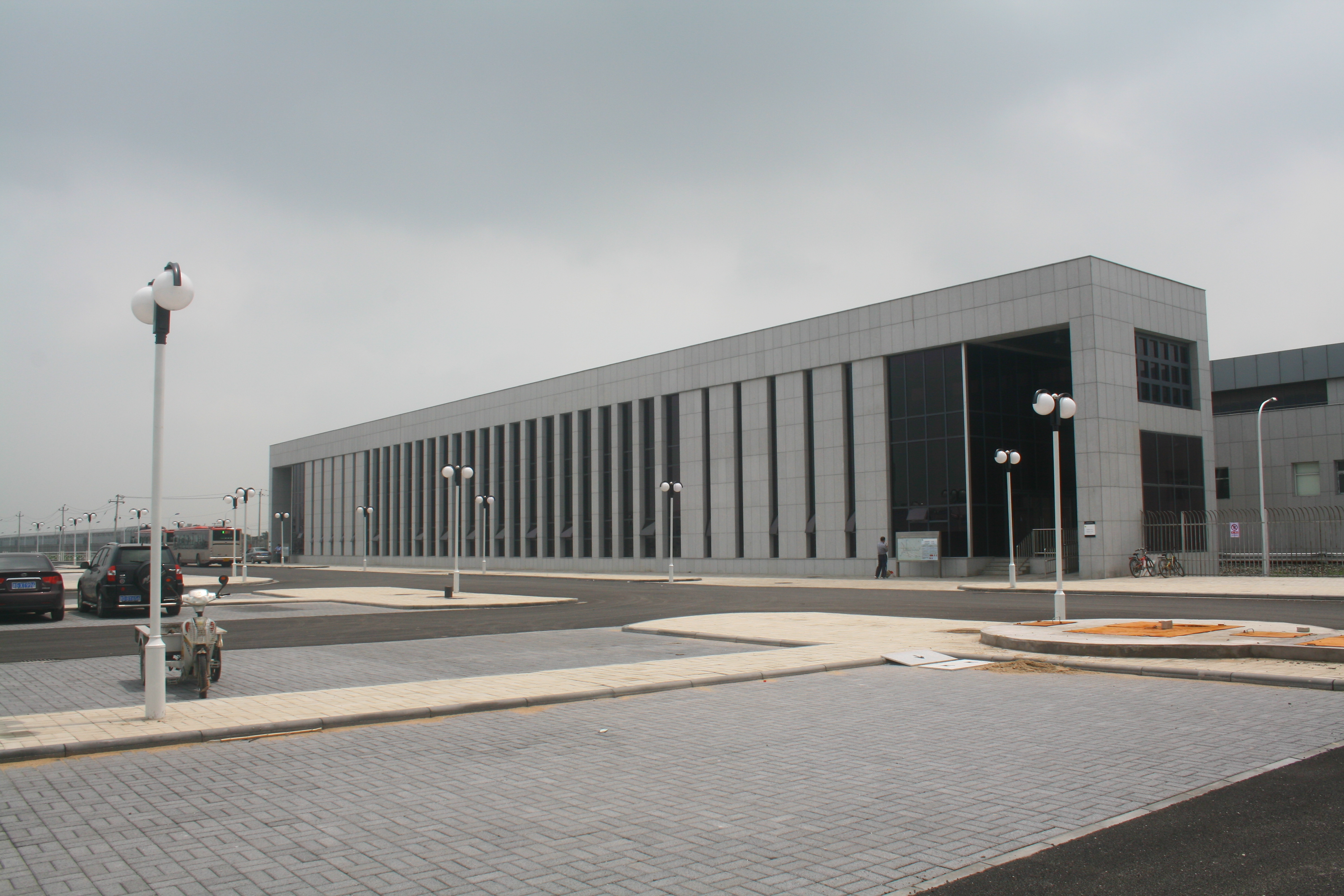 空港經濟區站站體